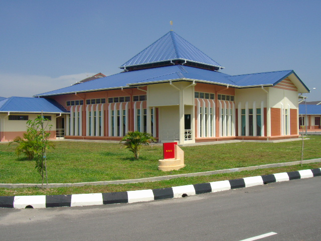 Maktab Rendah Sains Mara Merbok, Surau